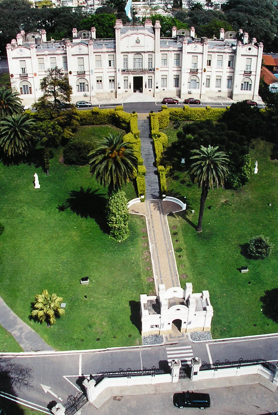 Regimiento de Granaderos a Caballo General San Martín.